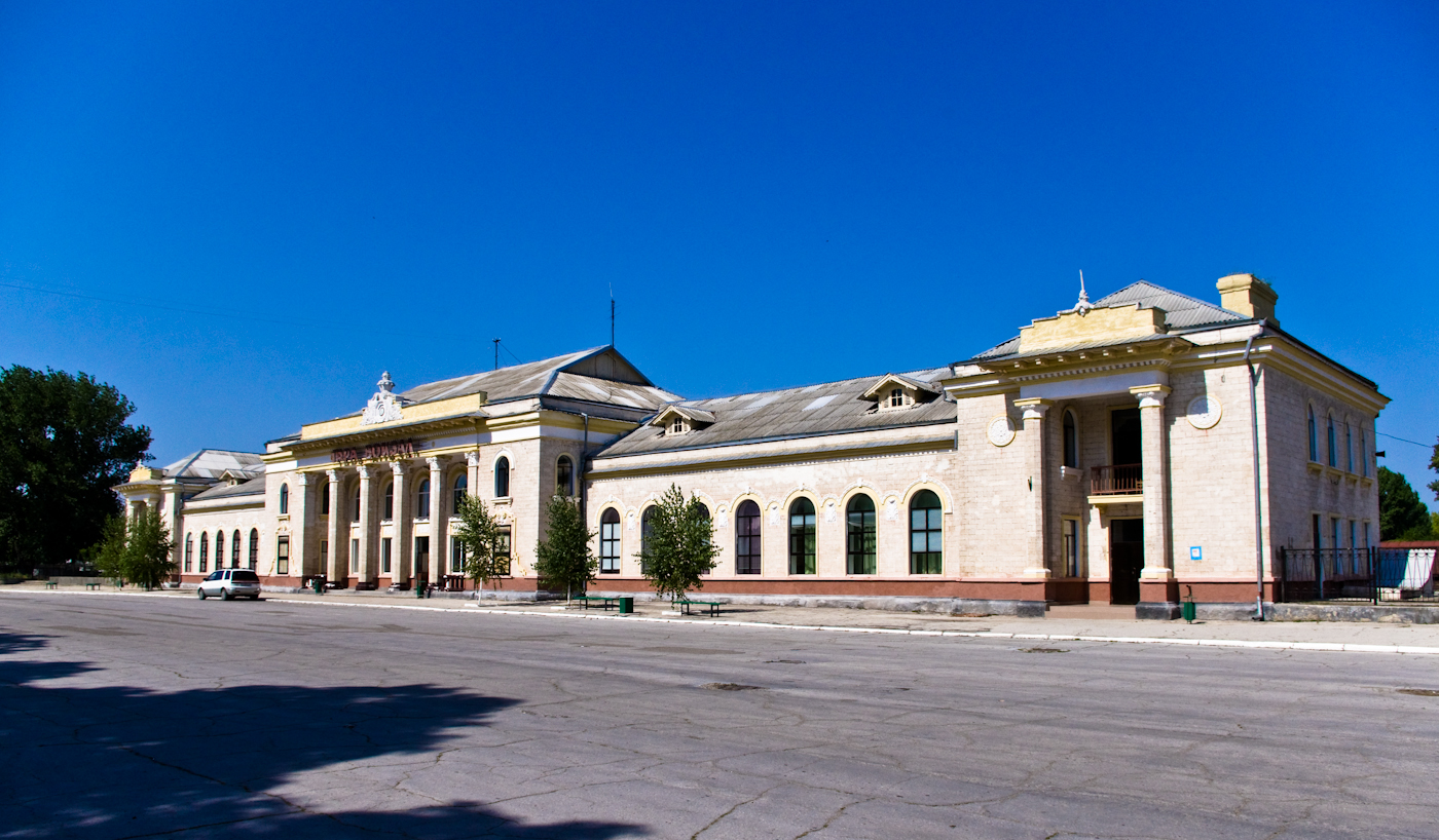 Станция Бендеры 1